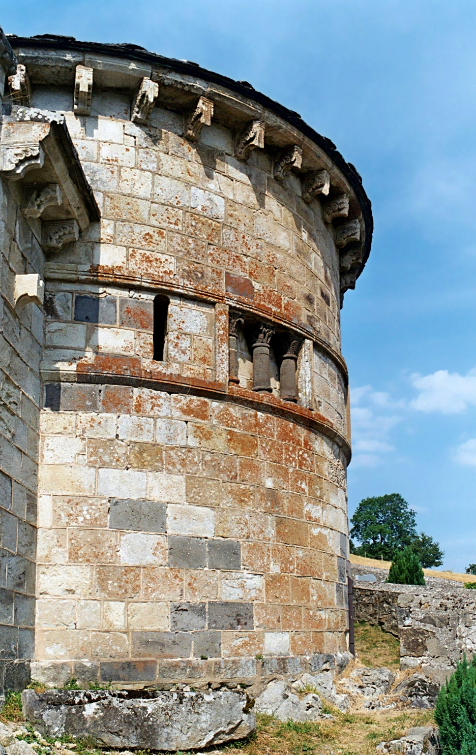 France - Auvergne - Puy-de-Dôme - Chapelle funéraire de Chambon-sur-Lac